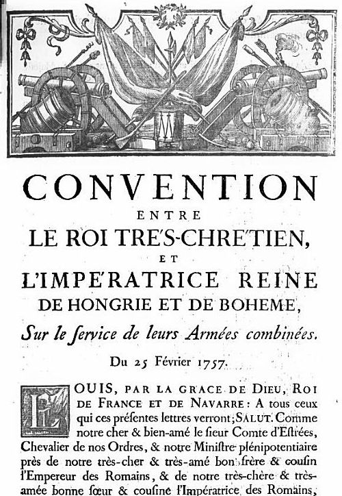 Deckblatt zu einem Folgedokuments des Vertrags von Versailles 1756